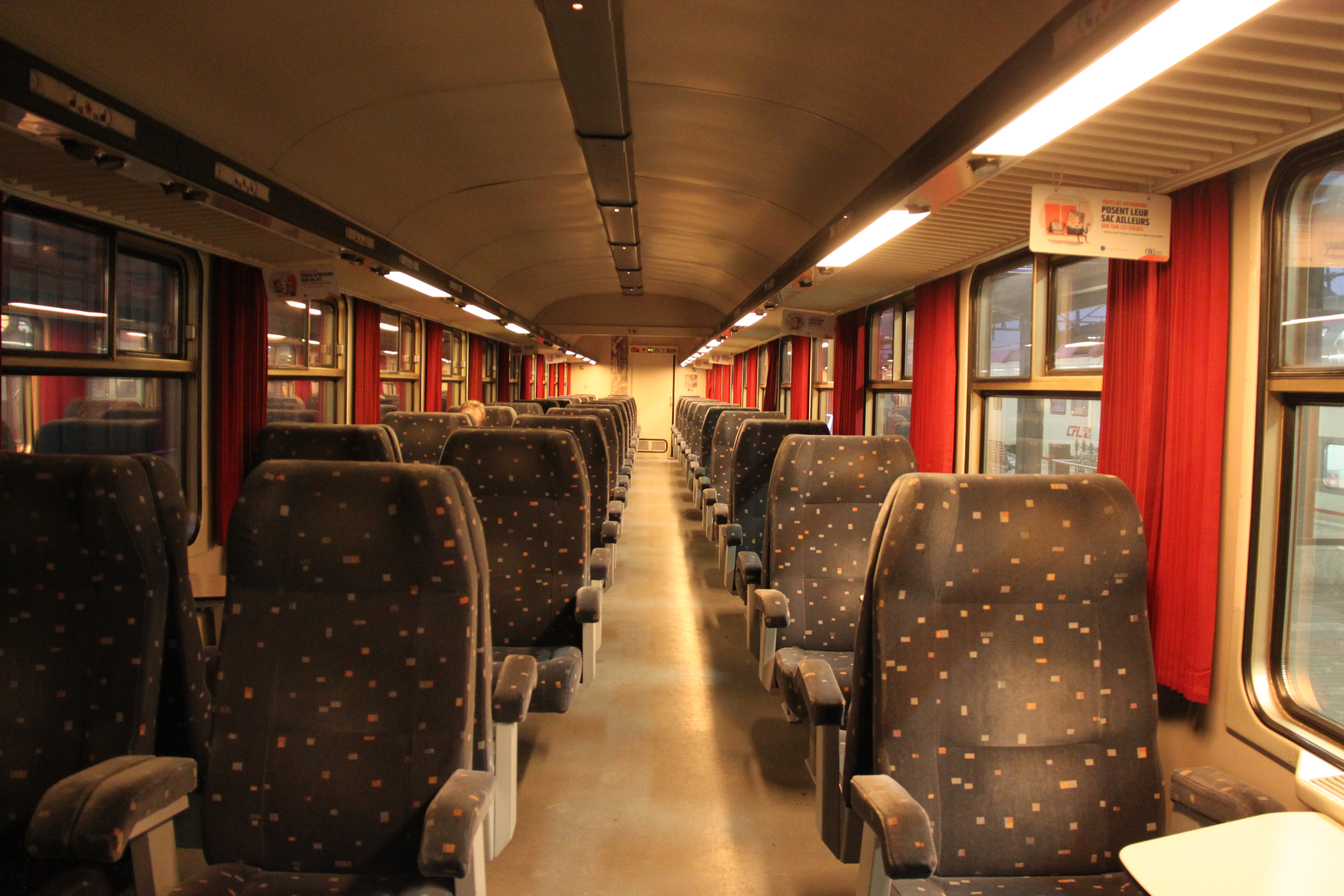 Interieur eerste klasse van een Belgisch I10-A11 rijtuig.